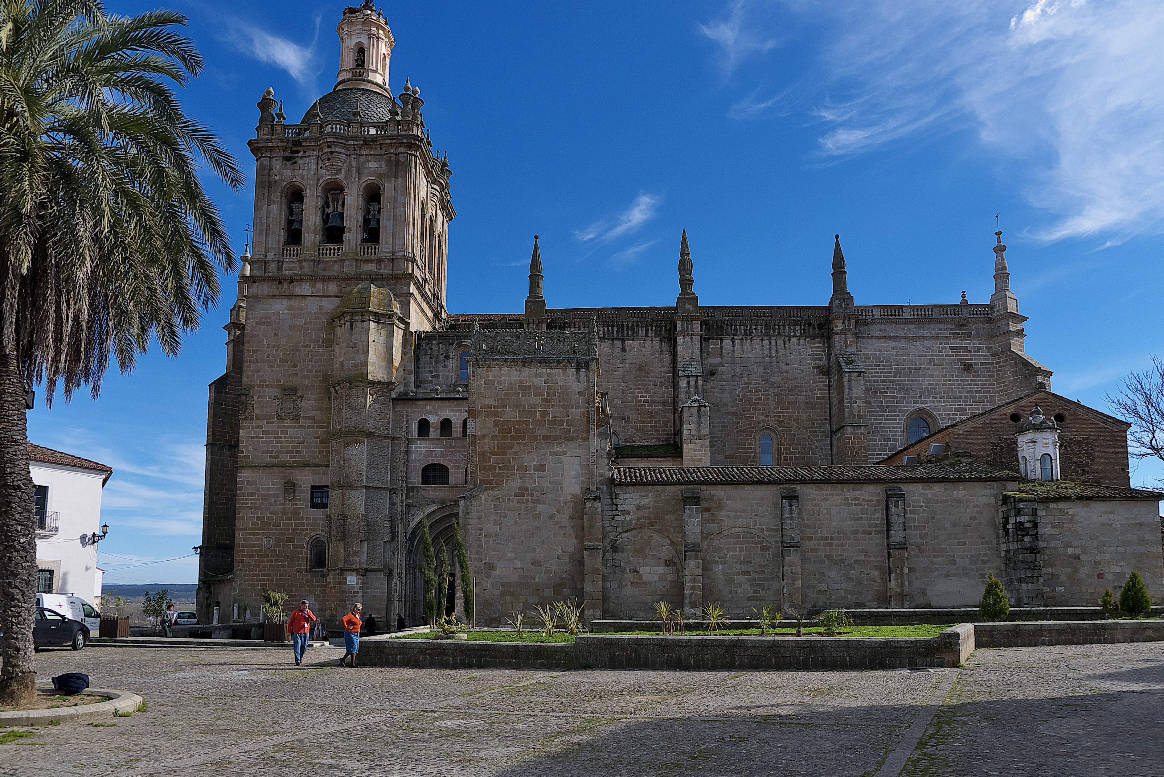 Catedral de Santa María de la Asunción. El maestro cántabro Martín de Solórzano presenta las primera trazas de la nueva catedral (1496), que desarrollaría Bartolomé de Pelayos (1502).